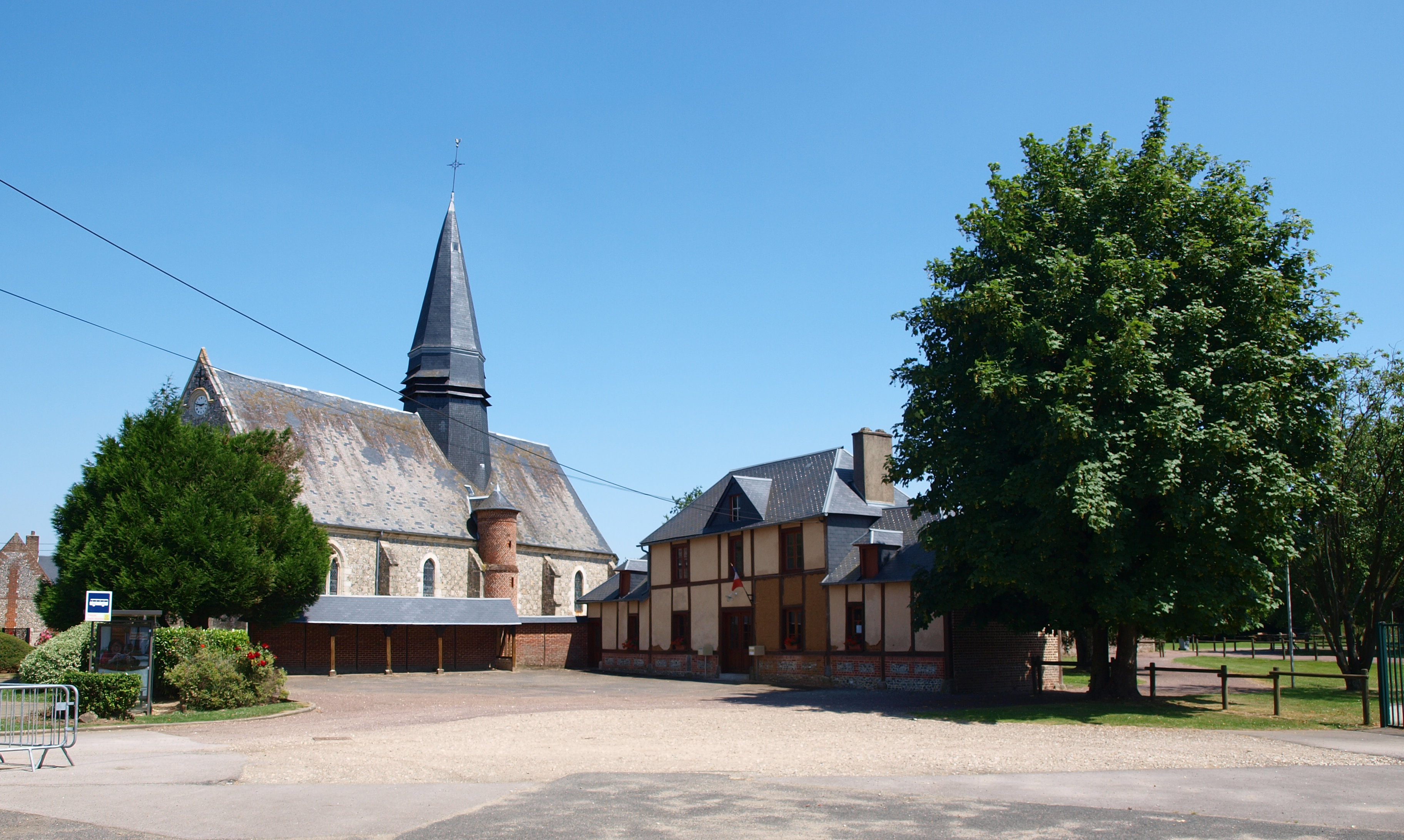 Saint-Maure (Oise, France) ; place de la mairie, vue depuis la mairie.